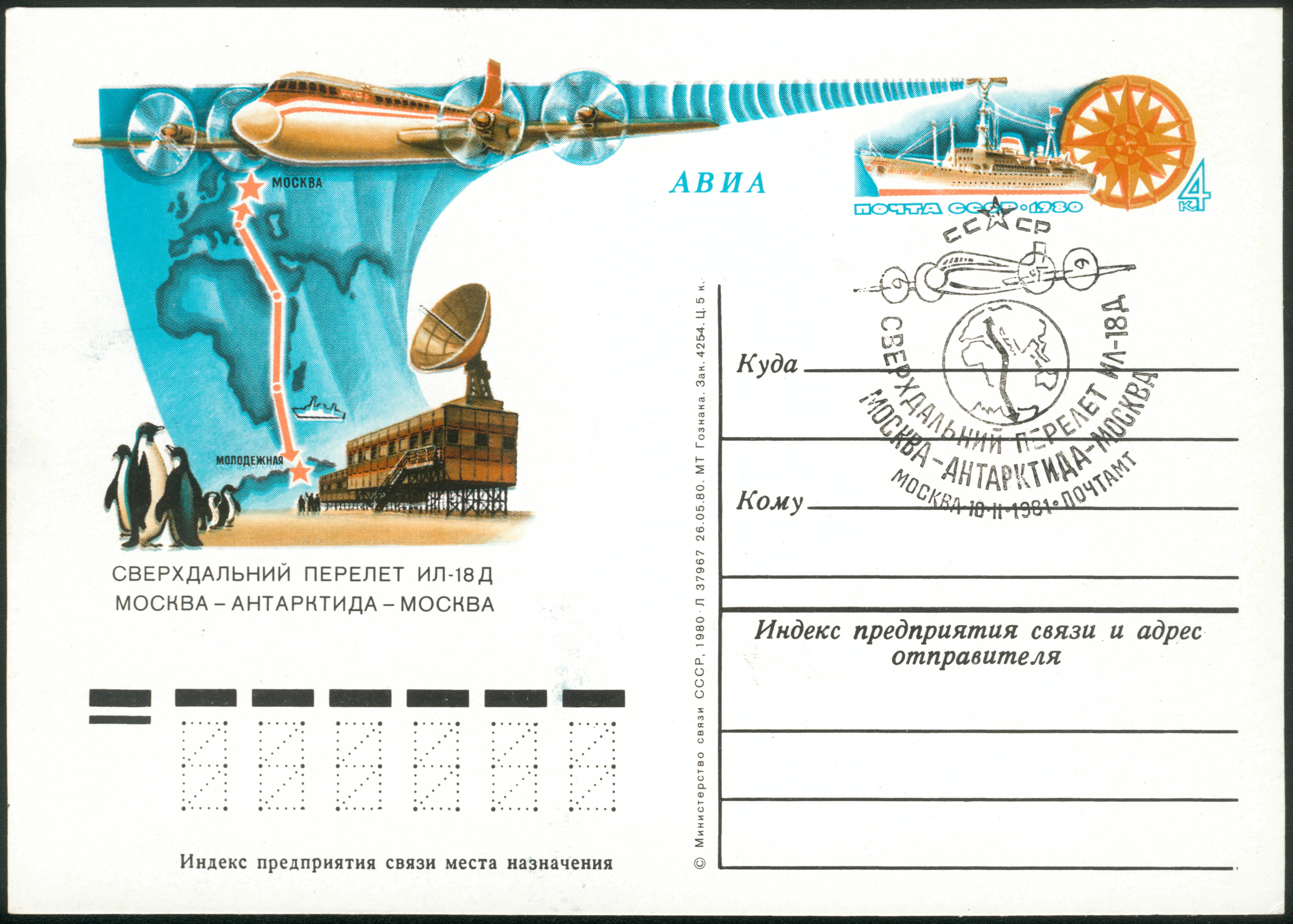 Postcard Polar flight IL-18, USSR original stamp, 1980/1981 Сверхдальний перелёт Ил-18Д Москва-Антарктида-Москва. Гашение 10 февраля 1981 Односторонняя почтовая карточка СССР с оригинальной маркой. 1980 год. Дата подписания в печать - 26 мая 1980. Тираж не указан.